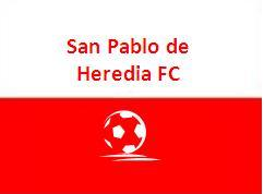 Bandera con los colores oficiales del equipo de futblo de San Pablo de Heredia.